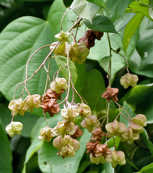 Bola - Kleinhovia hospita in Kolkata, West Bengal, India.